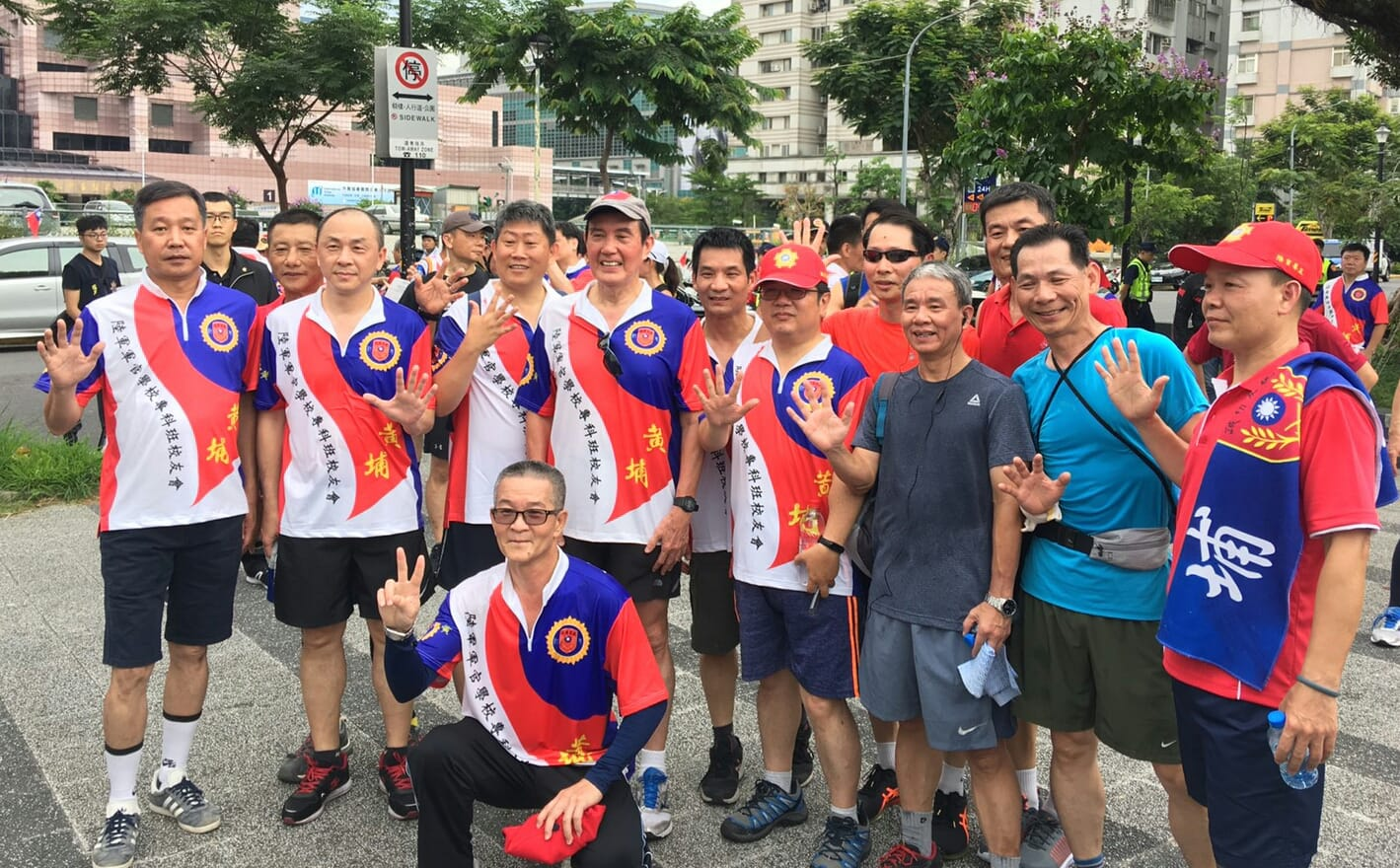 2019年6月9日陸官專五期參加陸官專科班校友會「愛國家愛國旗護臺灣」環島首站之路跑活動